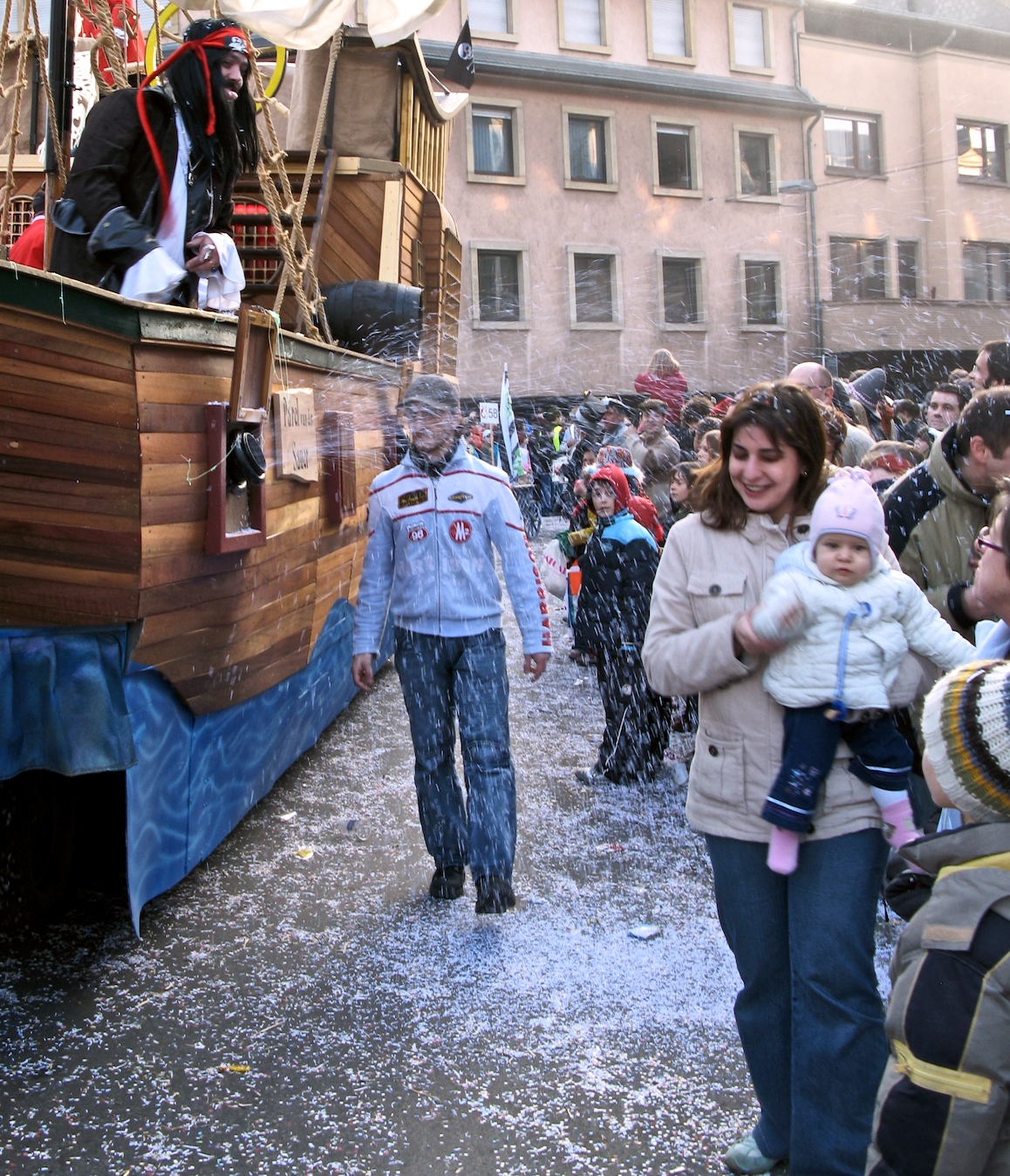 Konfetti: Konfettiskanoun op der Kavalkad zu Dikrech